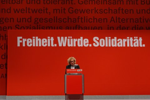 Parteitag mit Sabine Lösing